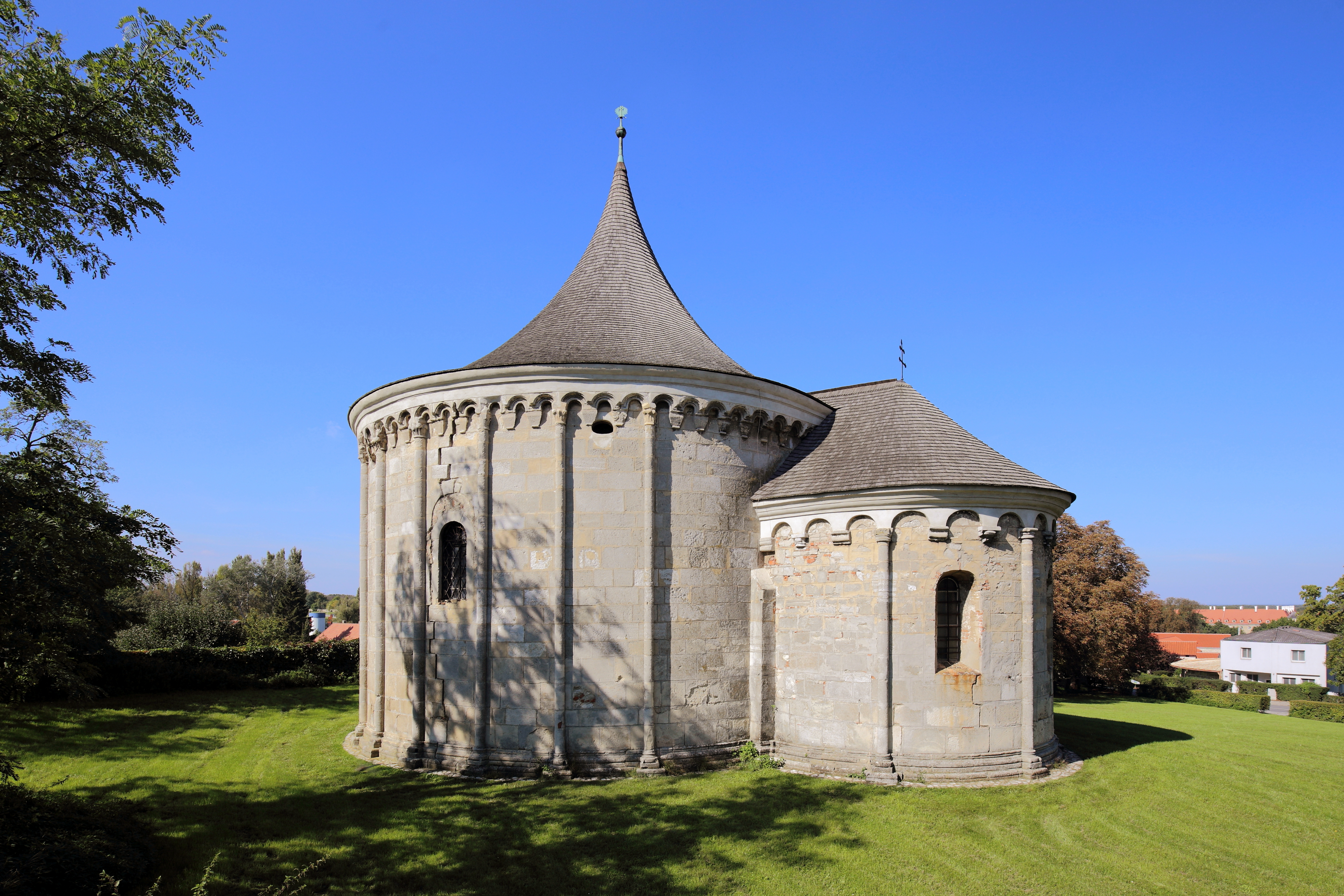 Südostansicht der Rundkapelle hl. Johannes der Täufer in der niederösterreichischen Marktgemeinde Petronell-Carnuntum. Der um 1200 errichtete romanische Sakralbau wird seit dem 18. Jahrhundert als Abensperg-Traun'sche Familiengruft (Petroneller Linie) genutzt.